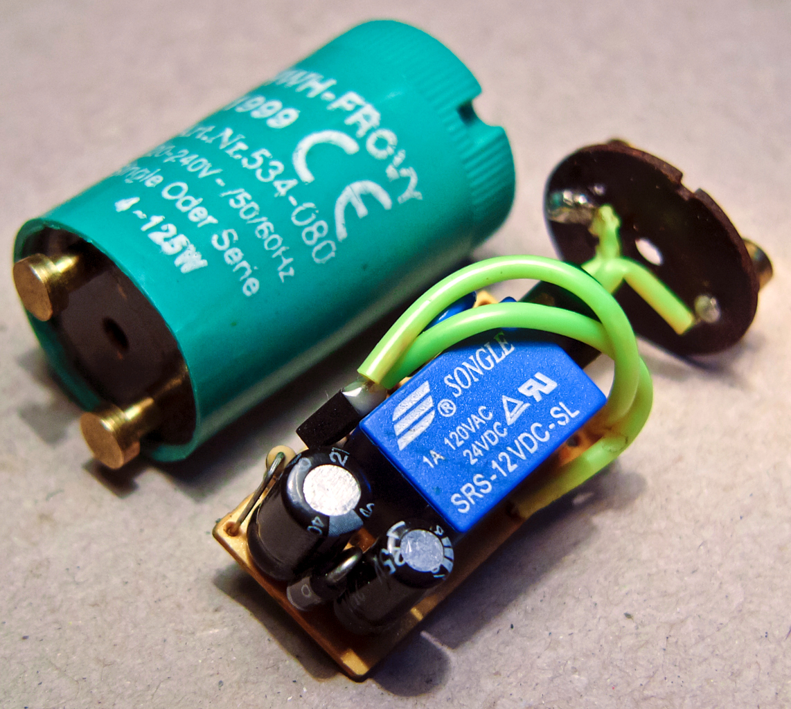 Schnellstarter für Leuchtstofflampen (Relaissteuerung)